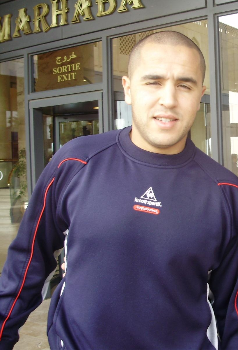 صورة للاعب الجزائري مجيد بوقرة